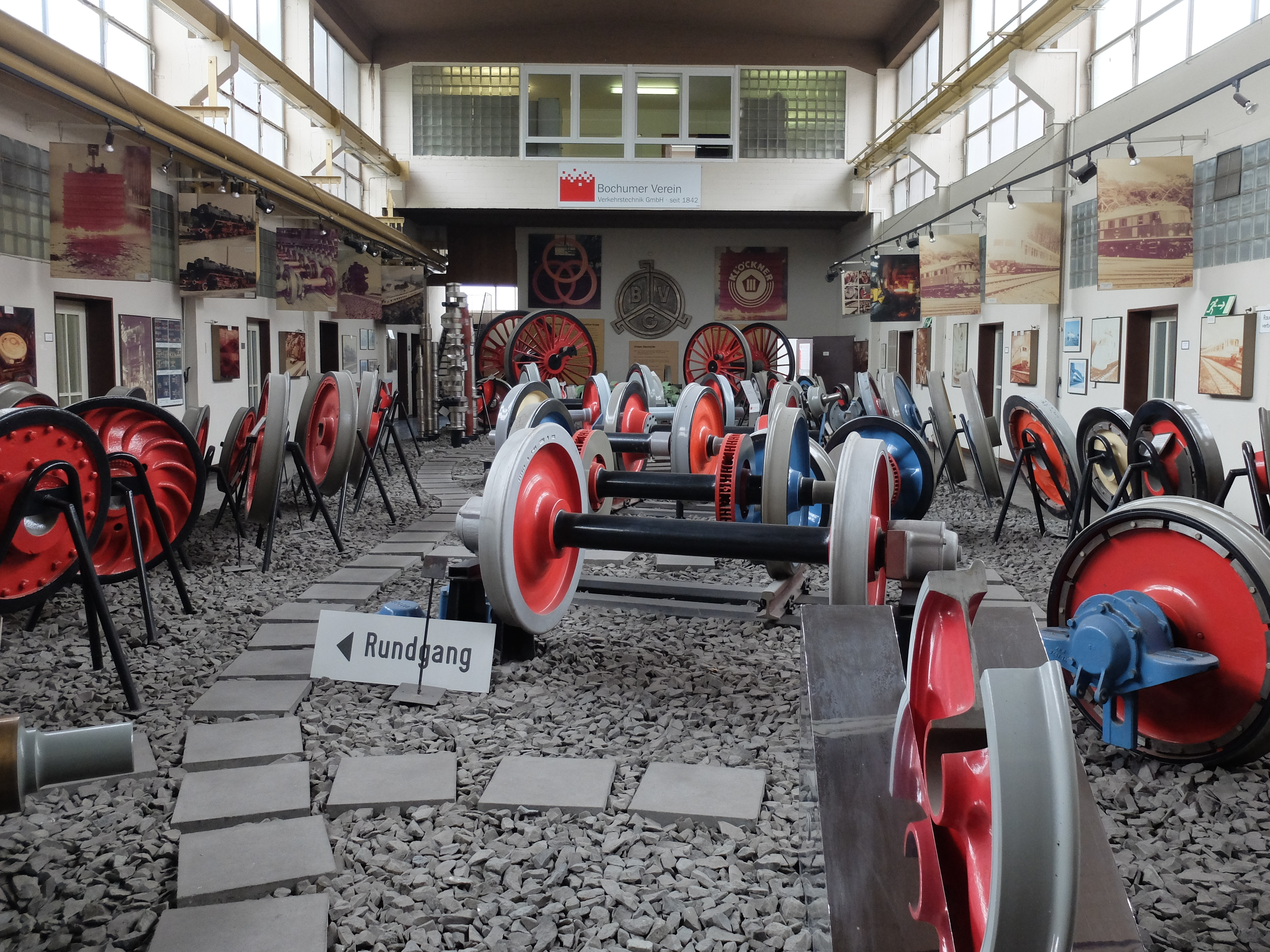 Rad- und Radsatzausstellung des Bochumer Vereins.